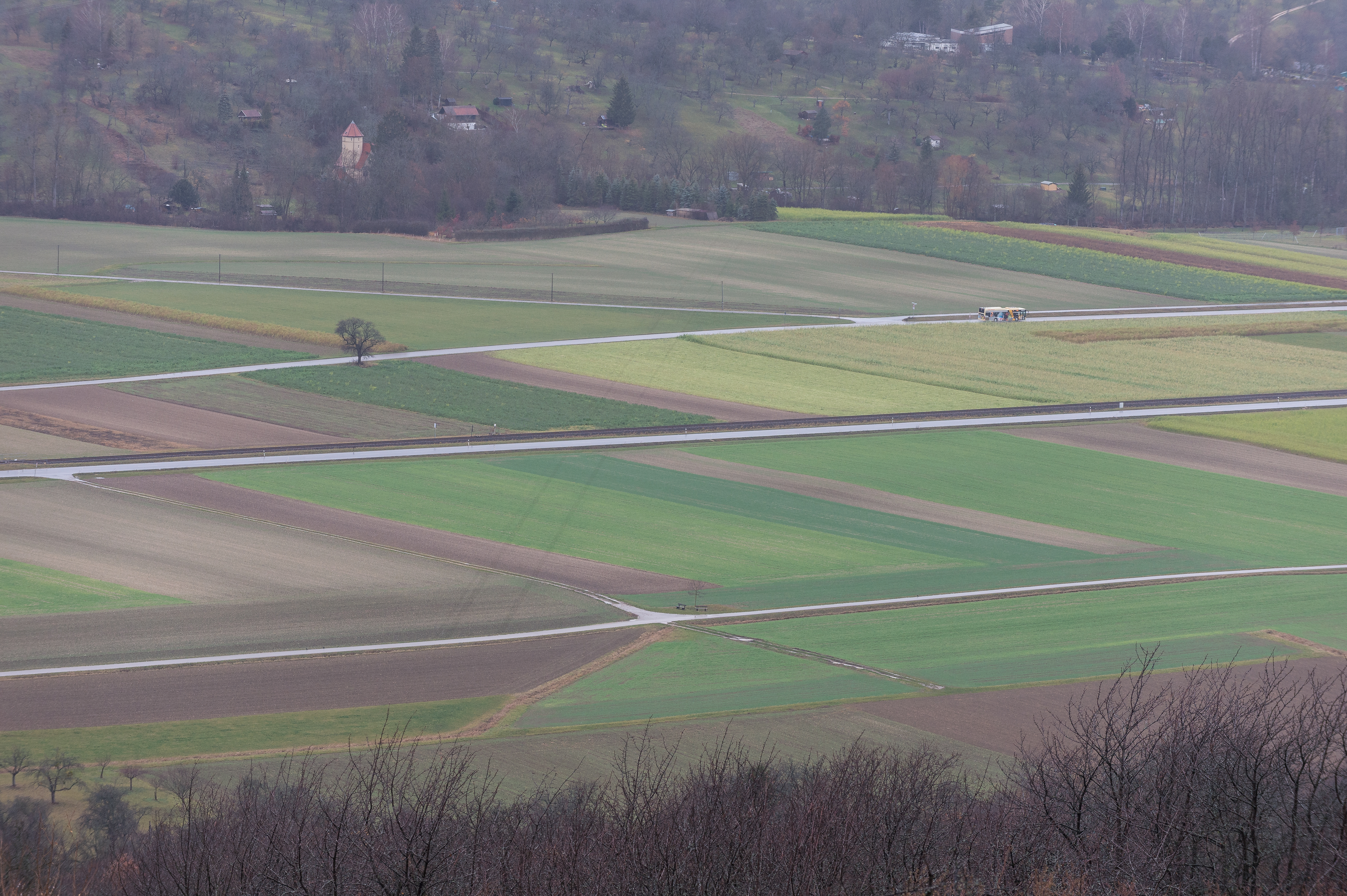 Die "Sibyllenspur" im Lautertal zwischen Owen und Dettingen unter Teck, ein Bewuchsmerkmal im Bereich der verfüllten Gräben des Lautertal-Limes. Foto bearbeitet.